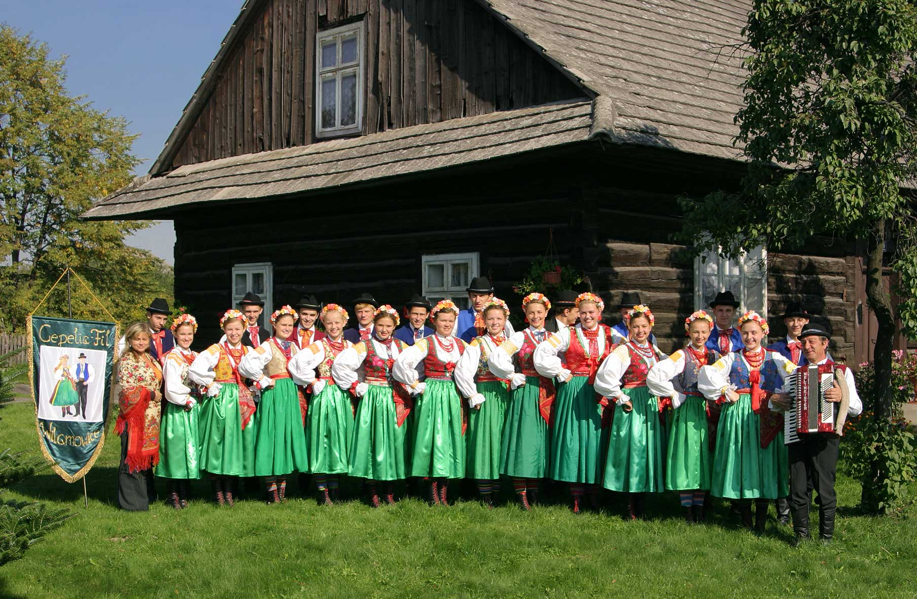 Regionalny Zespoł Pieśni i Tańca "Cepelia Fil Wilamowice"